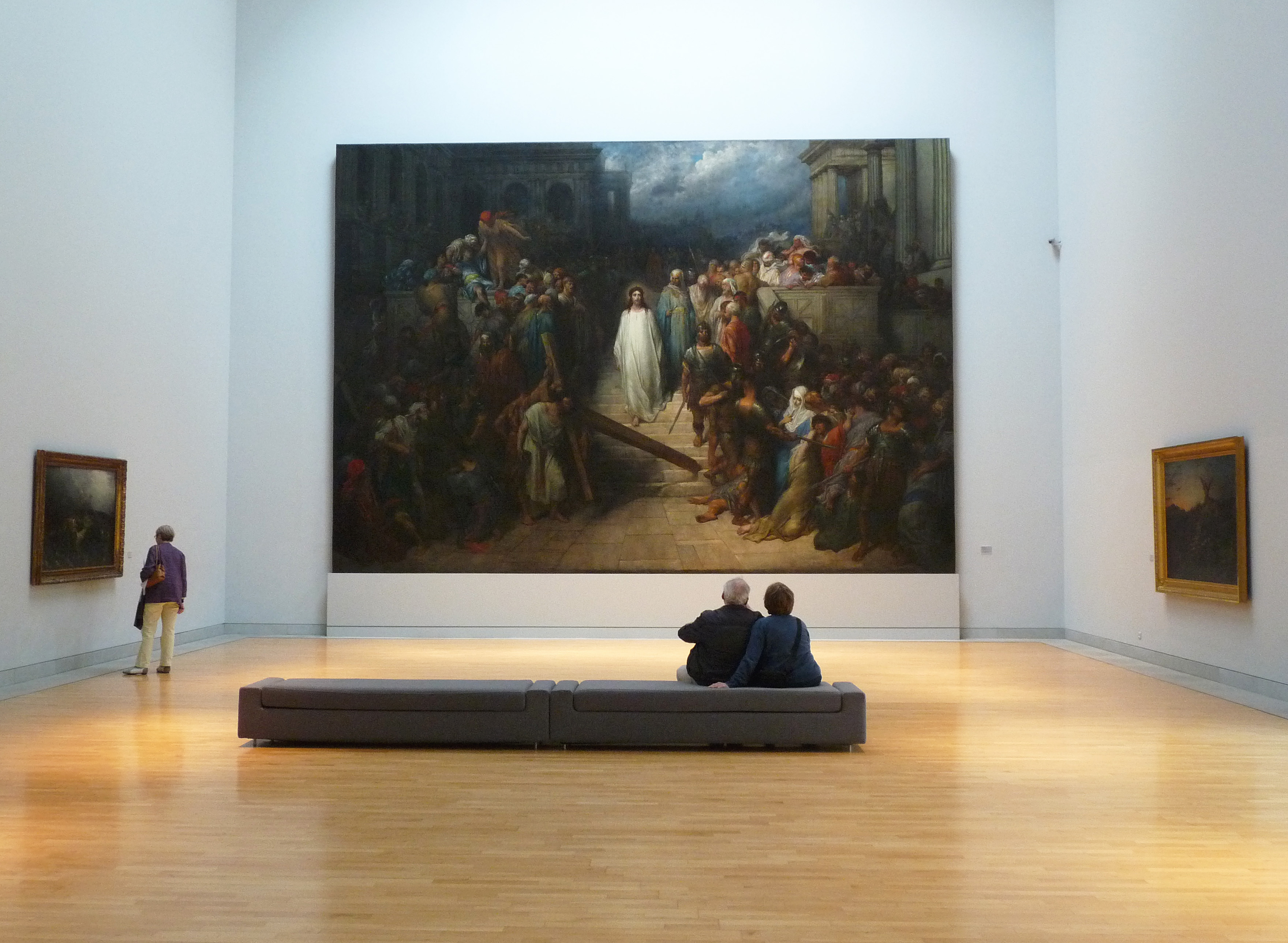 Gustave Doré, Le Christ quittant le prétoire, huile sur toile, Musée d'art moderne et contemporain de Strasbourg.